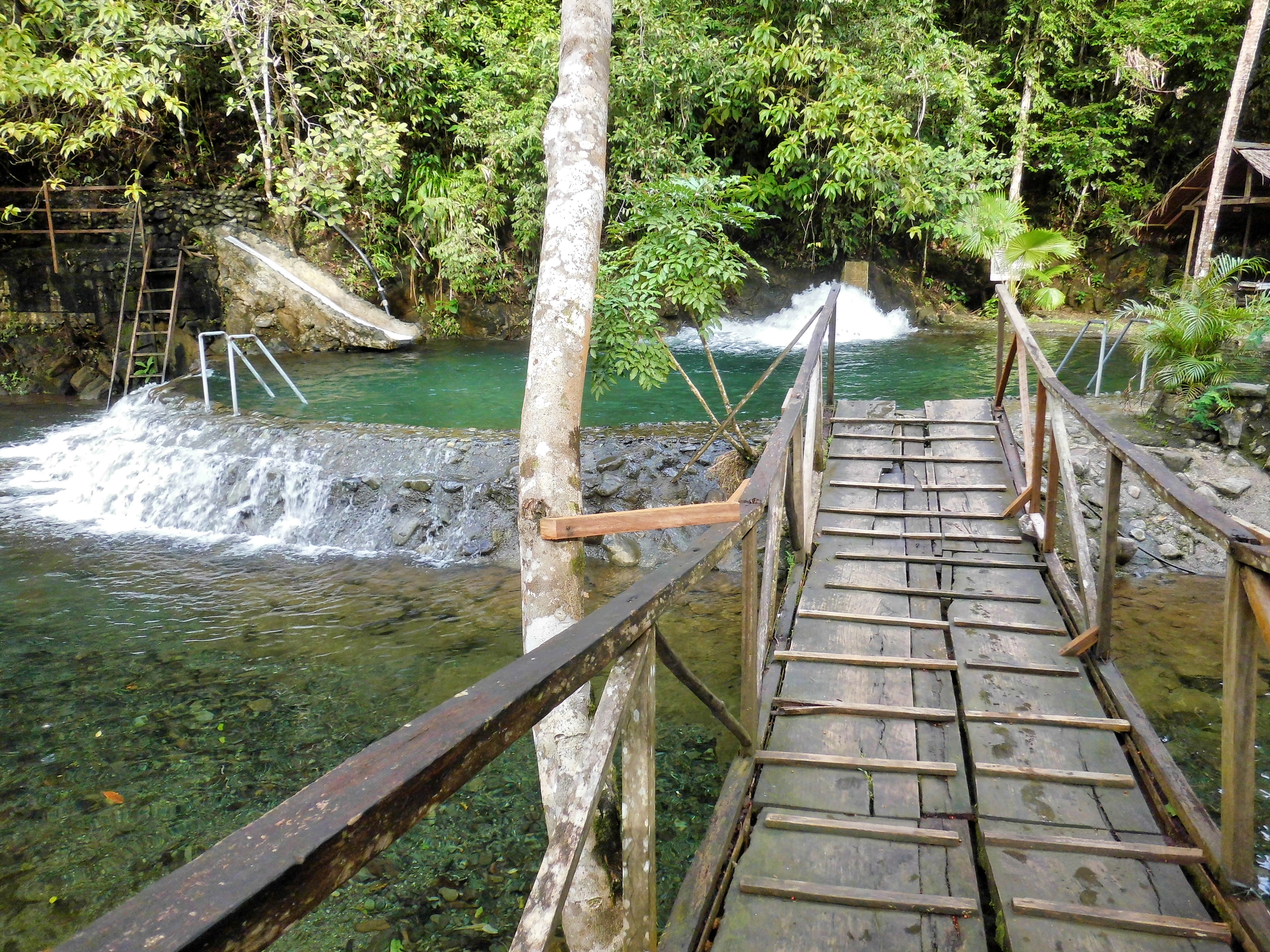 Urwaldbad "Sua cool spring" mit Wasserrutsche, Philippinen, Surigao del Sur, Madrid (Esperanza)